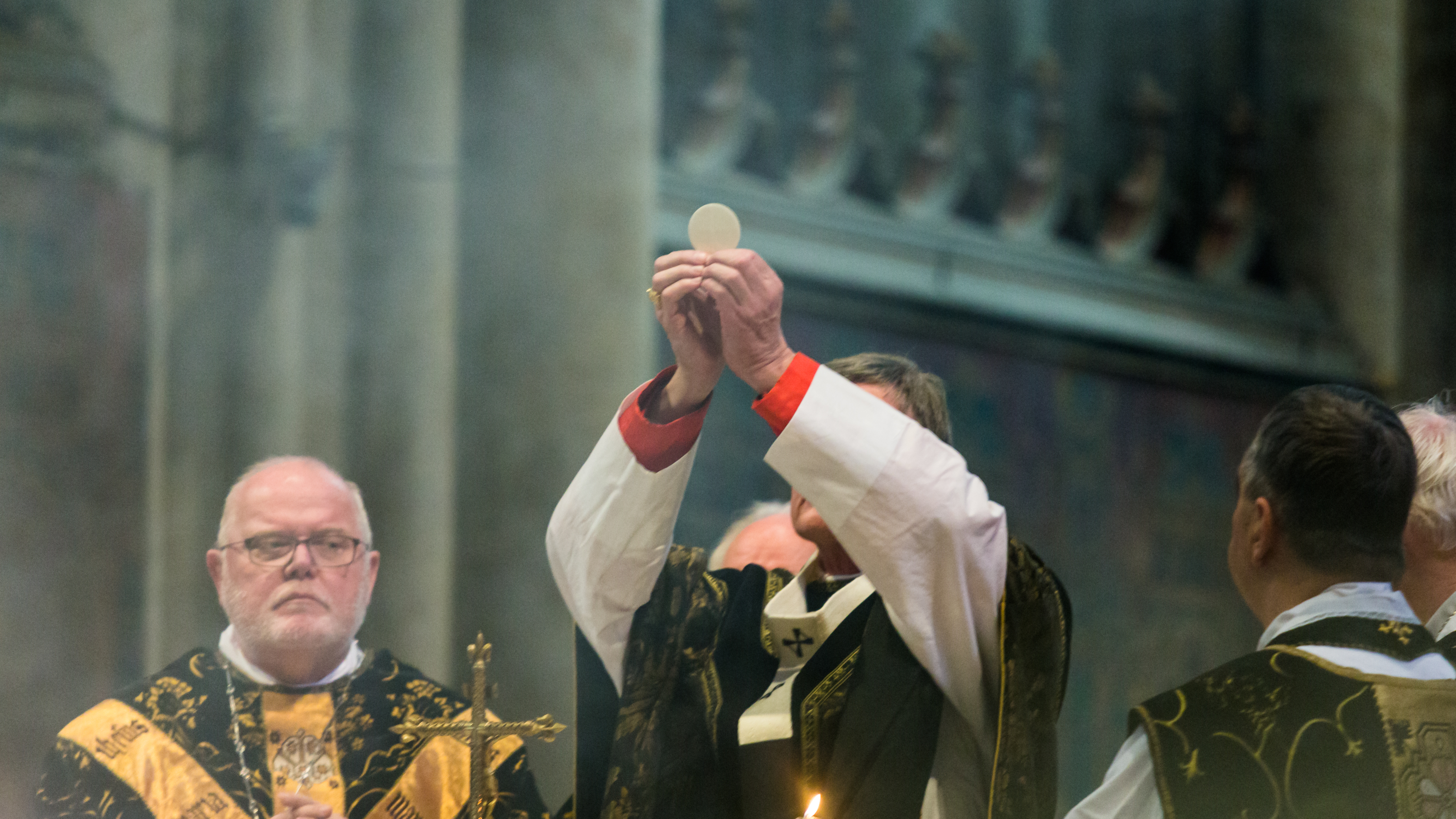 Exsequien Joachim Kardinal em. Meisner Foto: Kardinal Woelki zeigt beim eucharistischen Hochgebet der Gemeinde nach der Wandlung die Zelebrationshostie (Elevation). Links: Kardinal Reinhard Marx